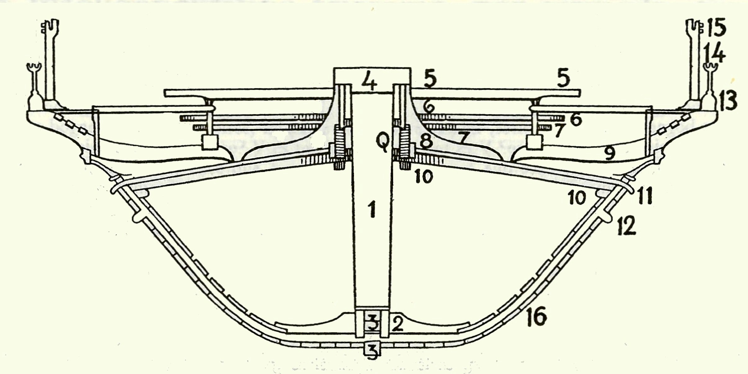 Esquema con la sección vertical de la cuaderna maestra de una galera, con el nombre de las principales partes que usualmente la componían..V.gr.:1, apoyo del palo mayor; 2, curva de sujeción de la carlinga del palo; 3, quilla y sobrequilla; 4, llave del palo; 5, banco ó bancada; 6, traviesa para engrilletar a los remeros; 7, banqueta para apoyo de los pies de los remeros; 8 y 9, curvas; 10, cubierta; 11, trancanil; 12, cinta; 13, postizas; 14, batayola; 15, batayola para las pavesadas; 16, forro